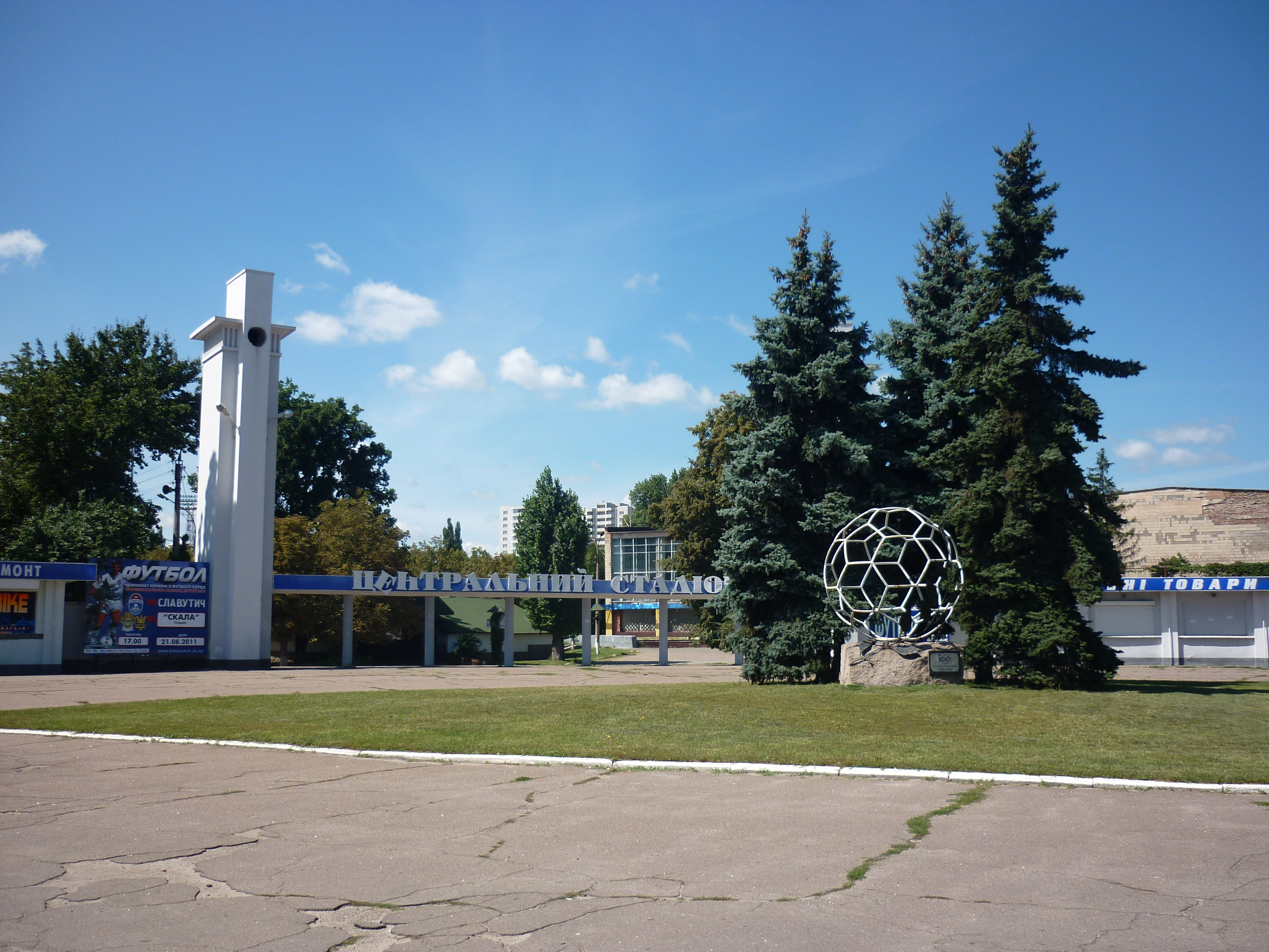 Стадіон "Центральний" у місті Черкаси до реконструкції в 2011 році. Головний вхід